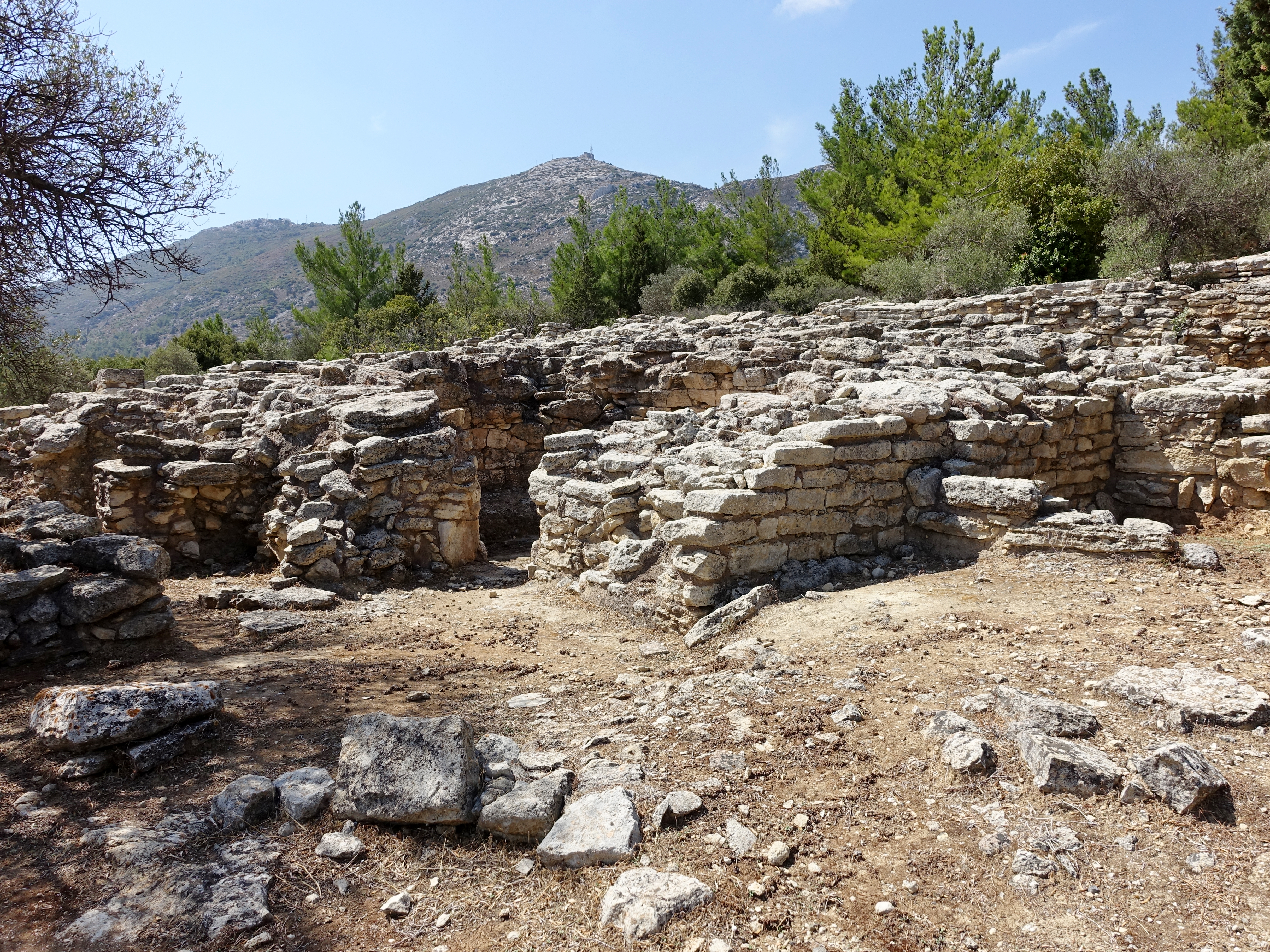 Ausgrabungsstätte von Phourni (Φουρνί), Gemeinde Archanes-Asterousia, Kreta, Griechenland